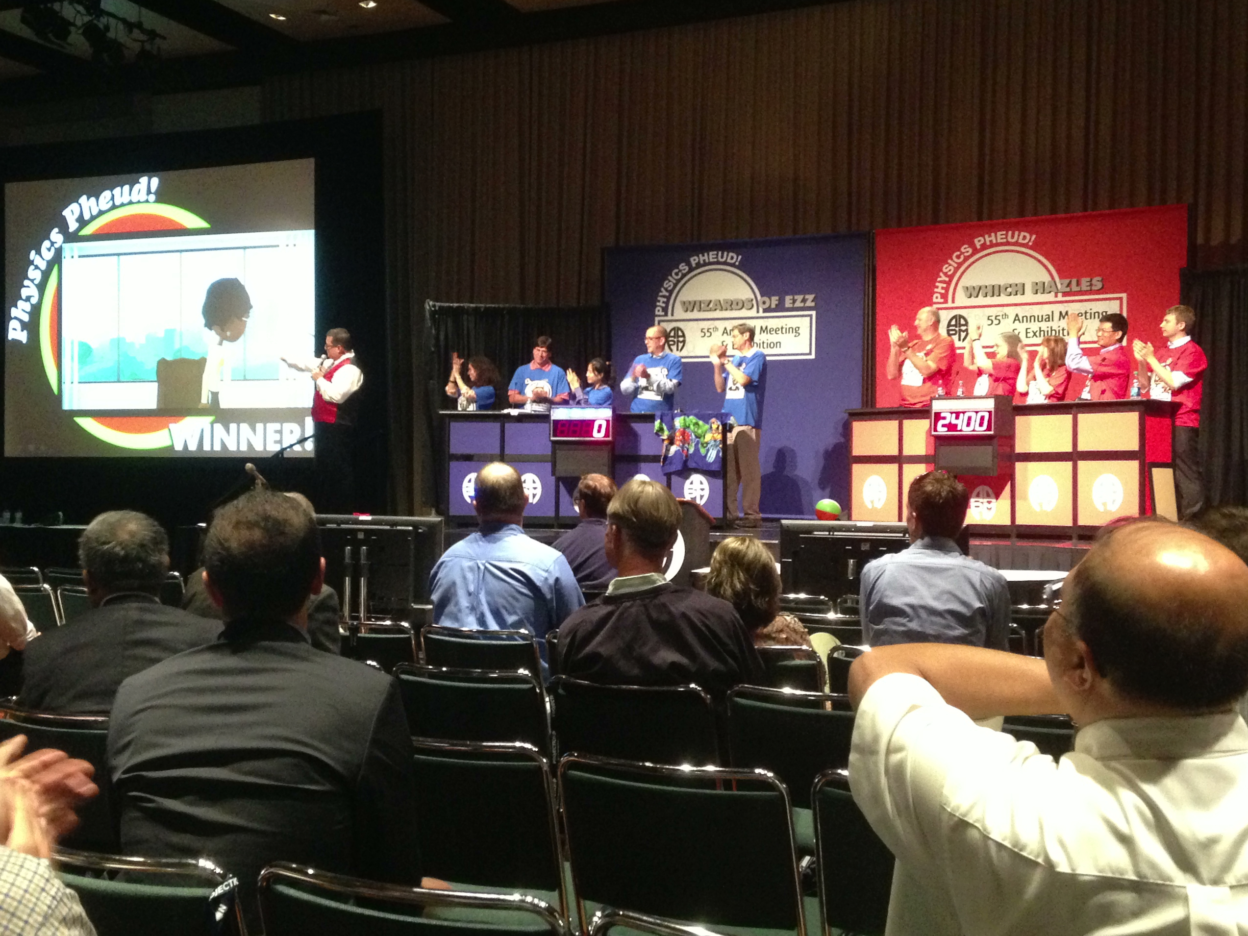 The Physics Pheud. 55th AAPM Annual Meeting, Indianapolis, IN. Team Red (Diagnostics) is represented by John Hazle. Team Blue (Therapy) is represented by Gary Ezzeli.